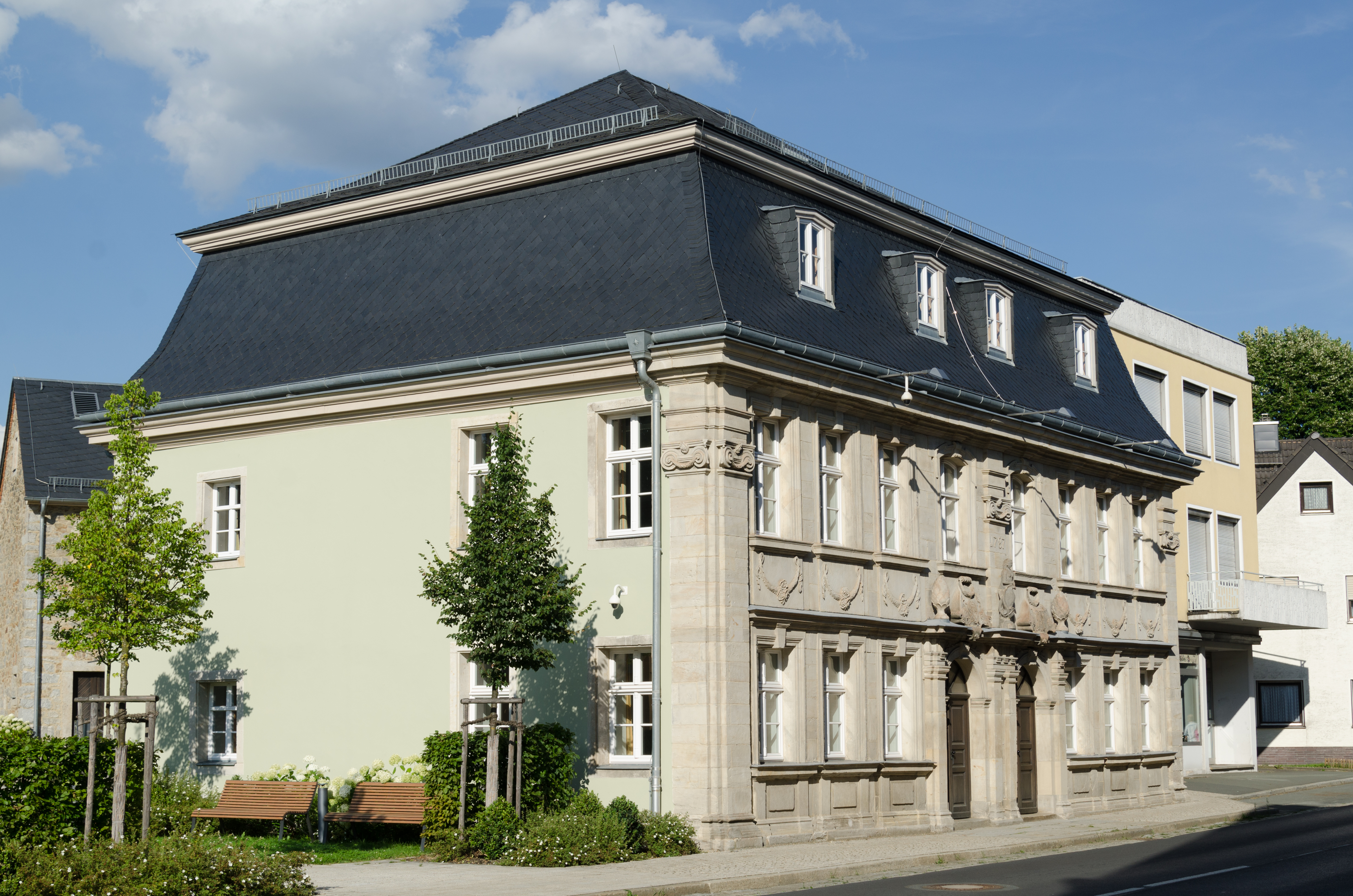 Gefrees, Hauptstraße 11, 13